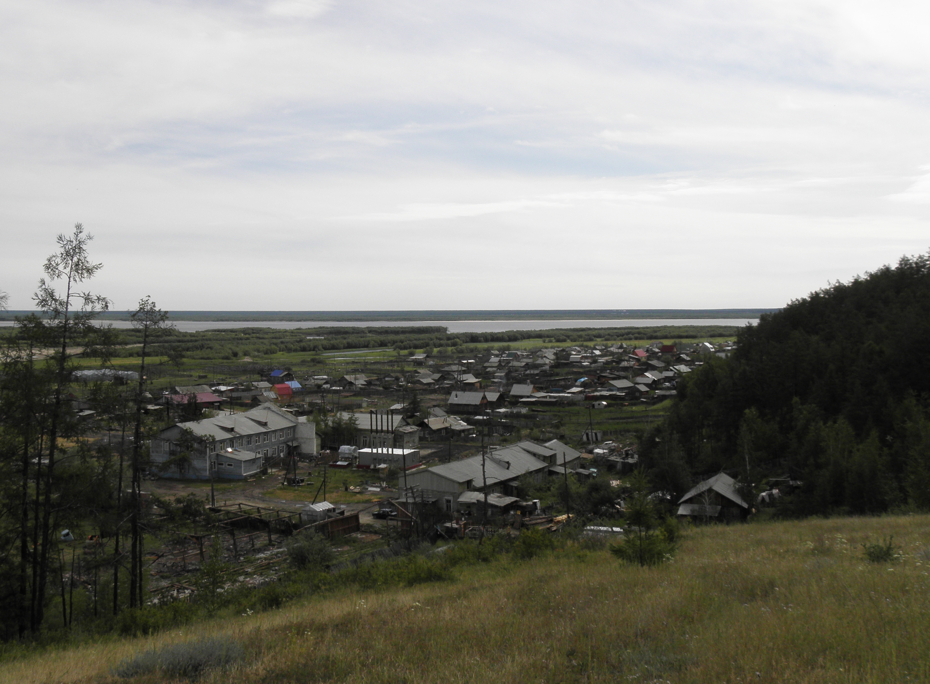 Вид на село Старая Табага с сопок